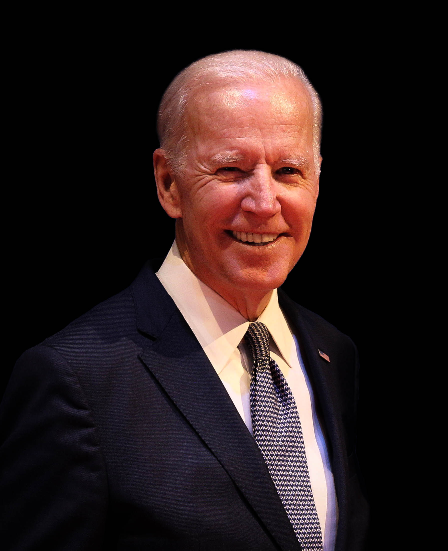 Joe Biden